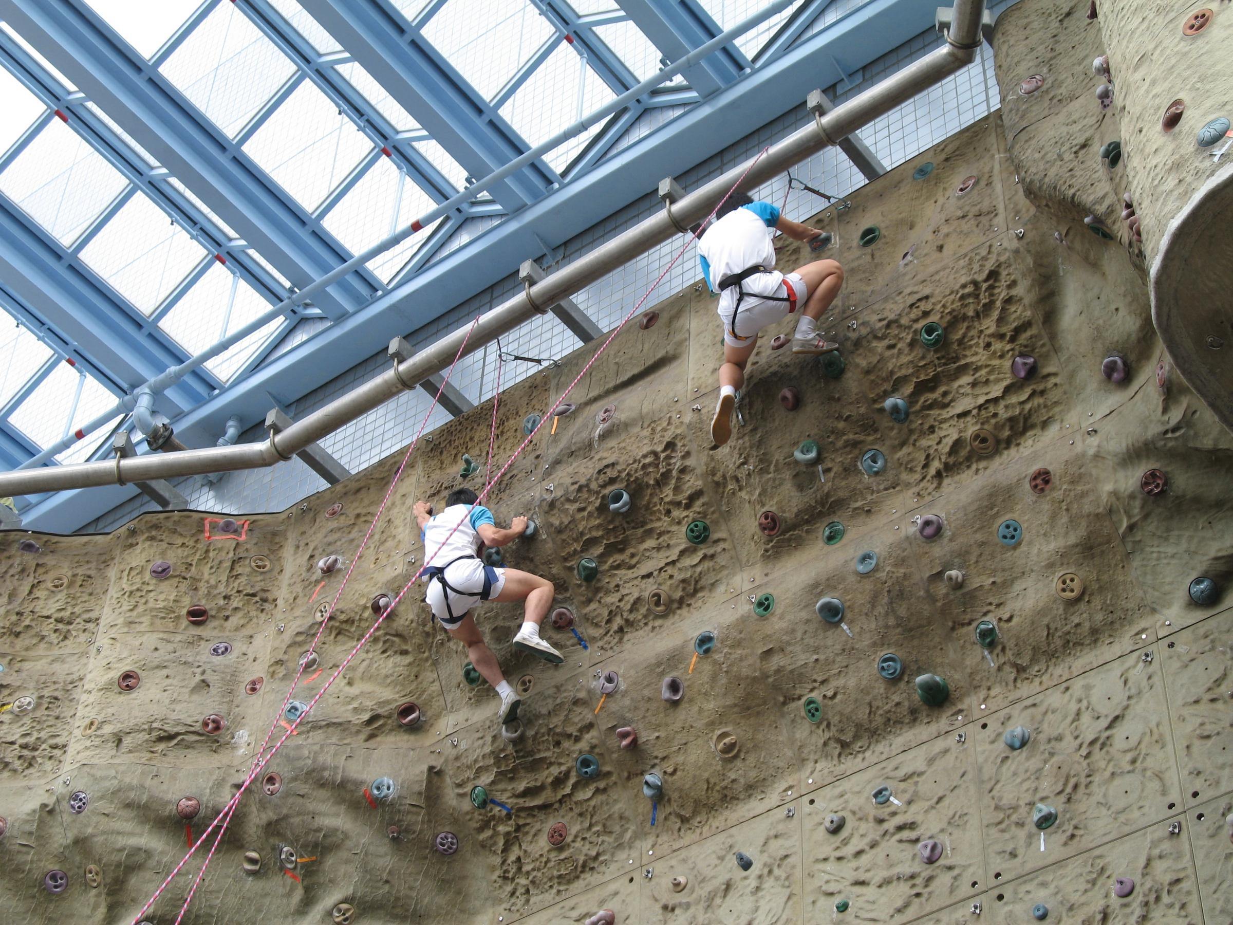 聖公會基孝中學 (SKH Kei Hau Secondary School). Author= DHauSing